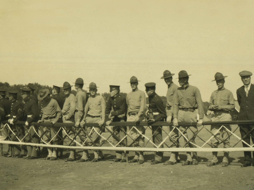 駐華各國軍隊派代表觀禮